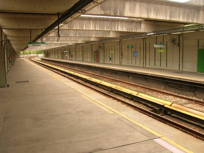 Foto da estação Inhaúma do Metrô Rio